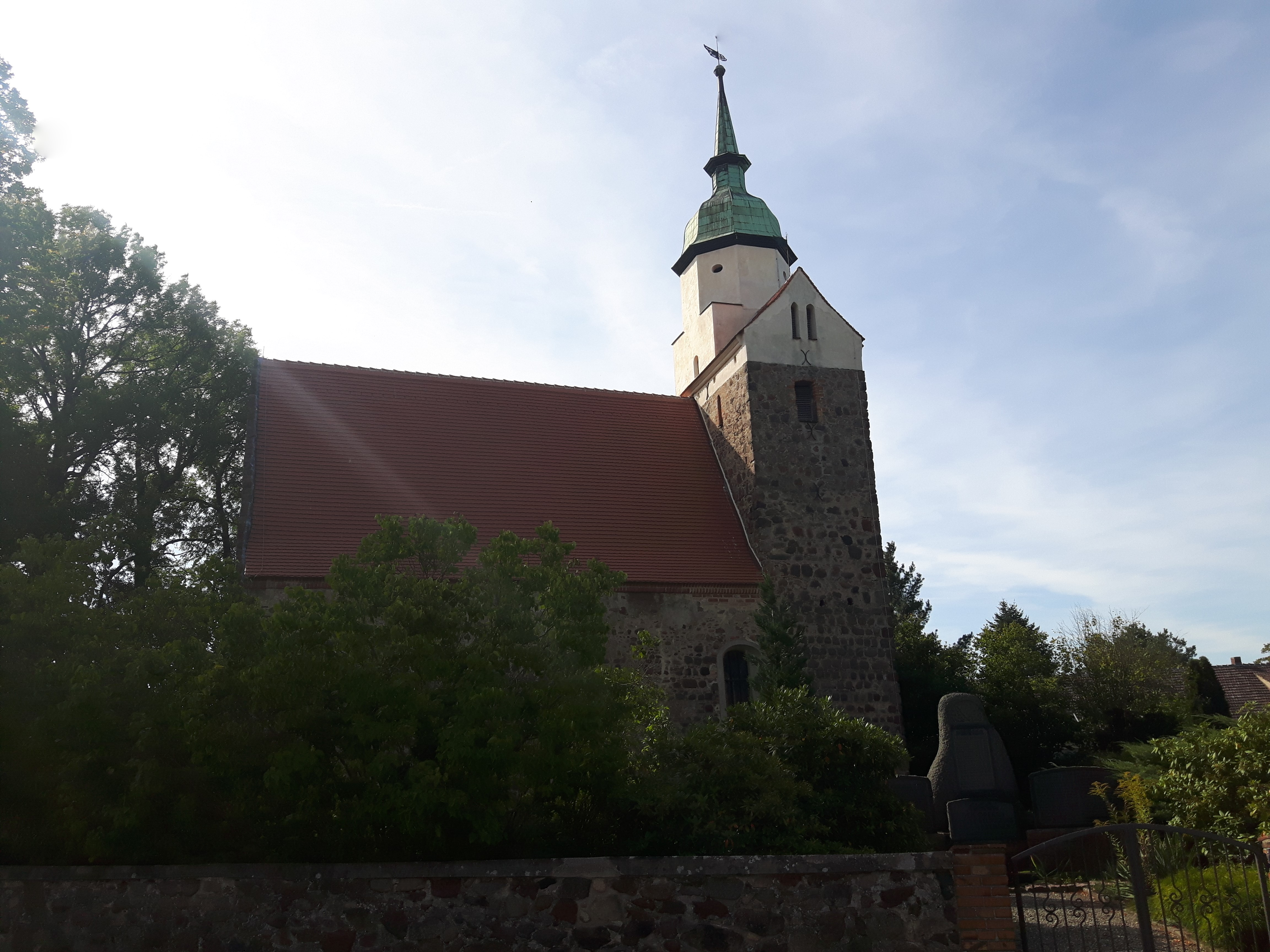 Dorfkirche Dollenchen